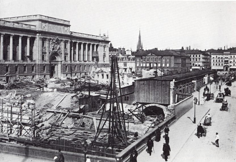 Riksdagshuset i Stockholm under bygget 1904